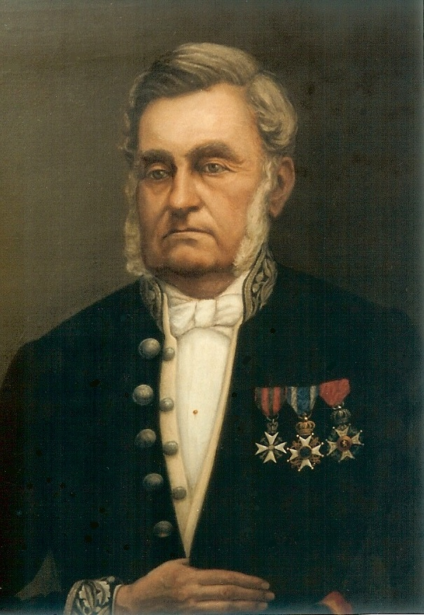 (1807-1890) Bourgmestre de Liège